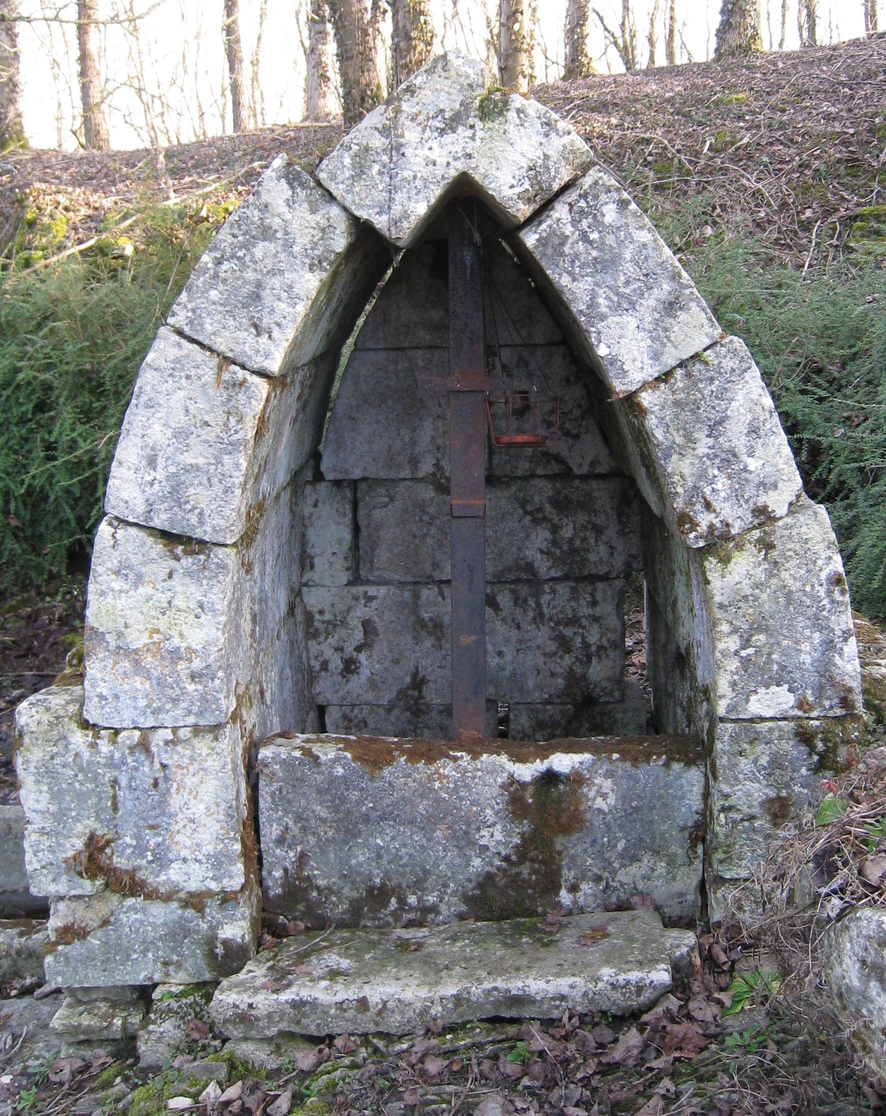 fontaine du Buet à Sacquenay